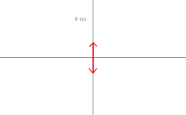 冲激偶函数图像